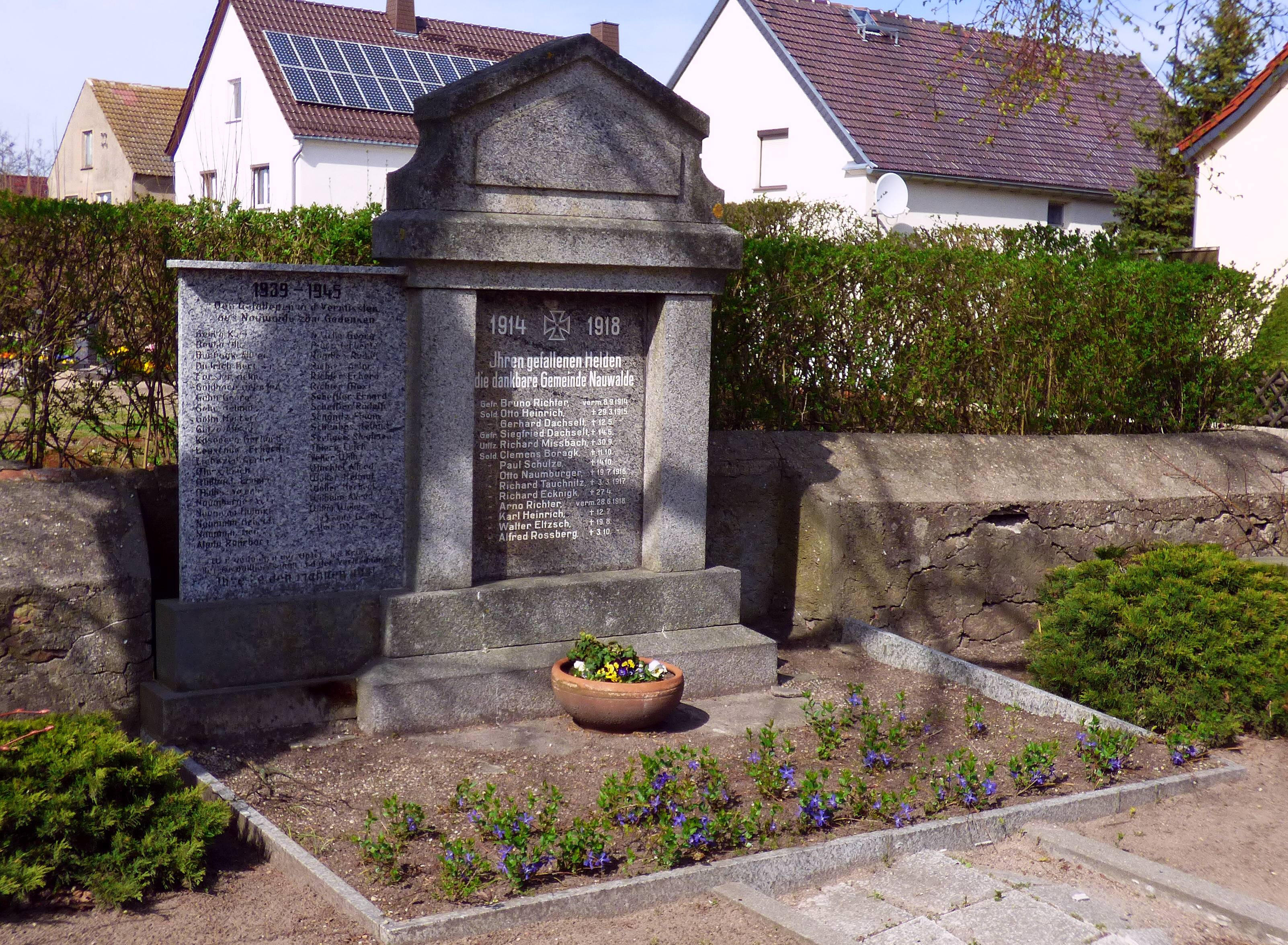 Kriegerdenkmal in Nauwalde